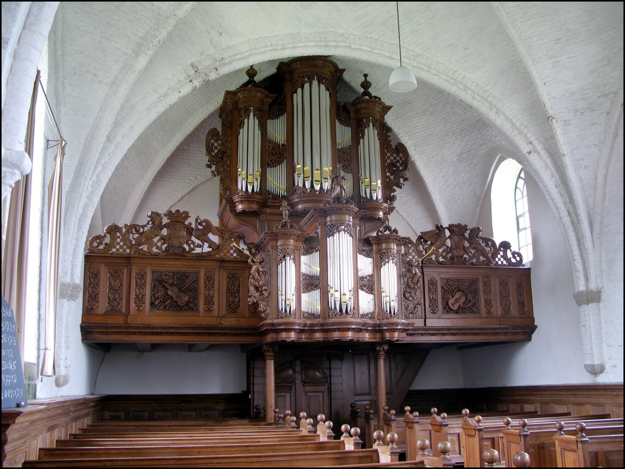 Orgel in Zandeweer, Niederlande